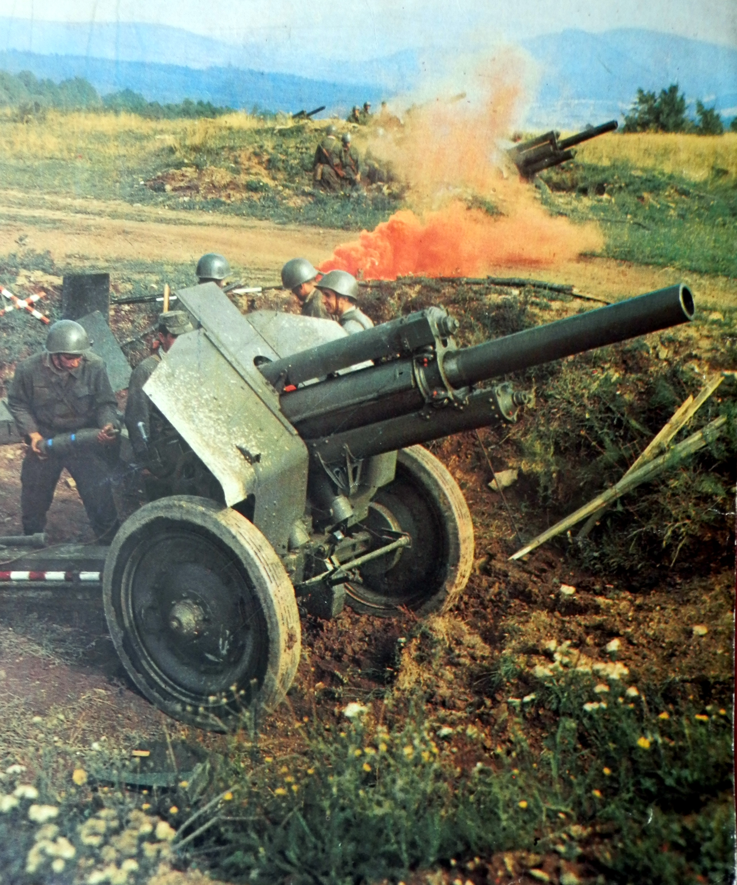 Obrázok z roku 1971, september. Vojaci základnej služby ČSĽA, z delostreleckého oddielu 79. motostreleckého pluku Benešov pri Prahe. Účasť na bojových ostrých streľbách vo VVP Boletice, Šumava. Československo.